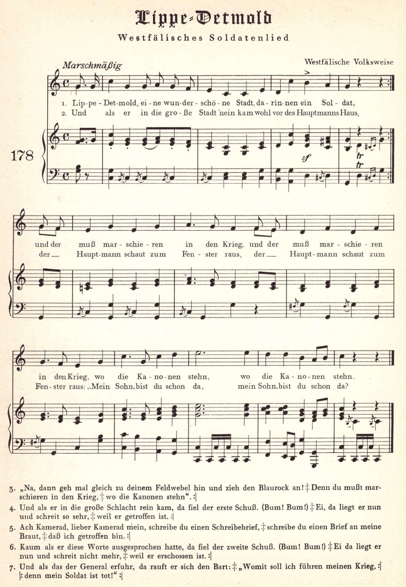 Lippe-Detmold, eine wunderschöne Stadt, Klaviersatz von Max Friedlaender